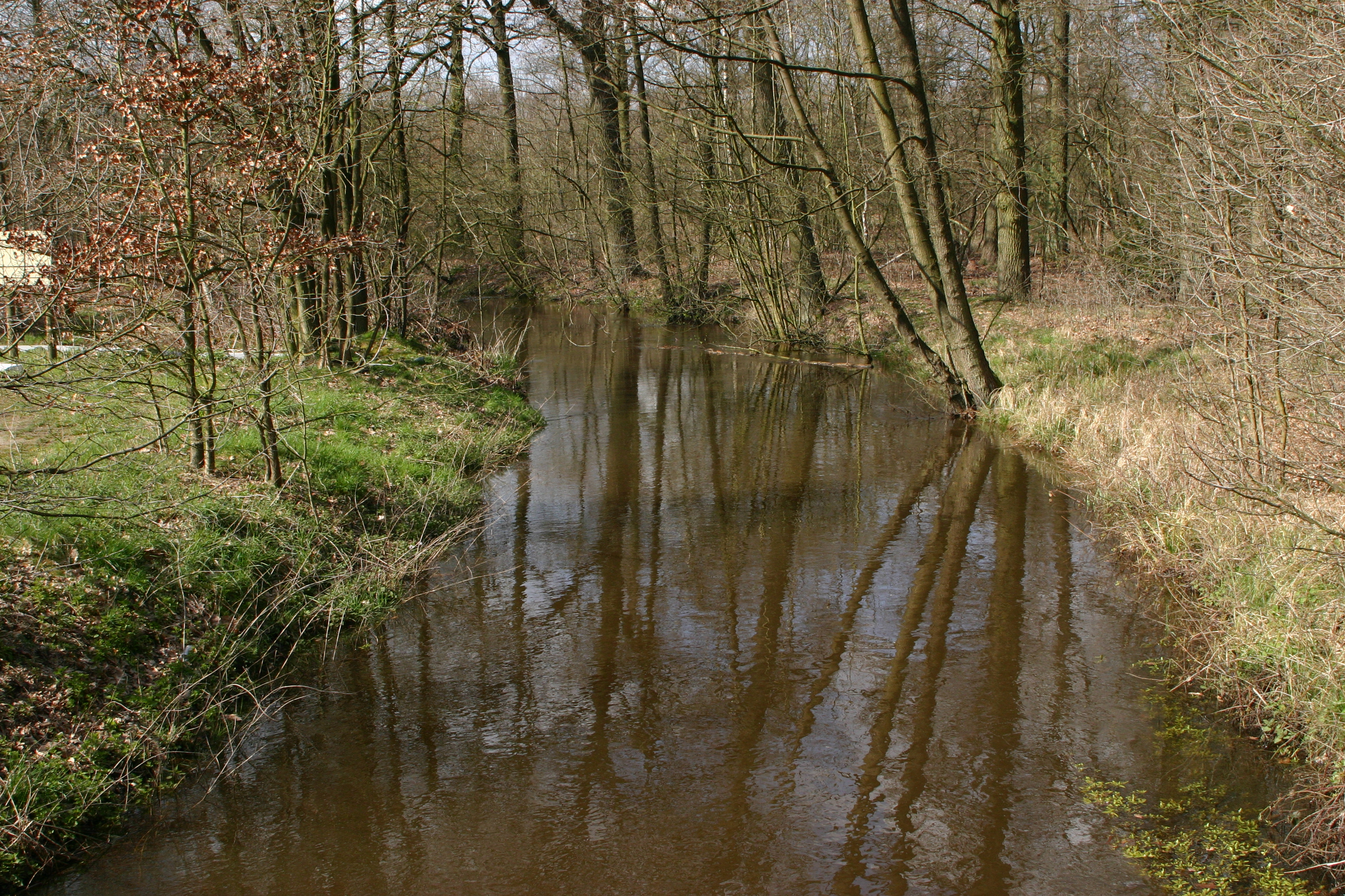 Warmbeek am Bësch gesi vun der Strooss mat dem Numm Beverbeek zu Hamont-Achel. Kategorie:Baachen an der Belsch